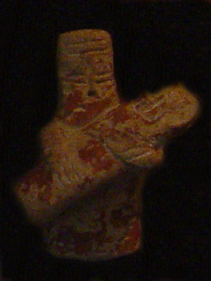 Idol mit Wickelkind aus Ton mit rotem, poliertem Überzug. 2100-200 v. Chr. aus Hagia Paraskevi.